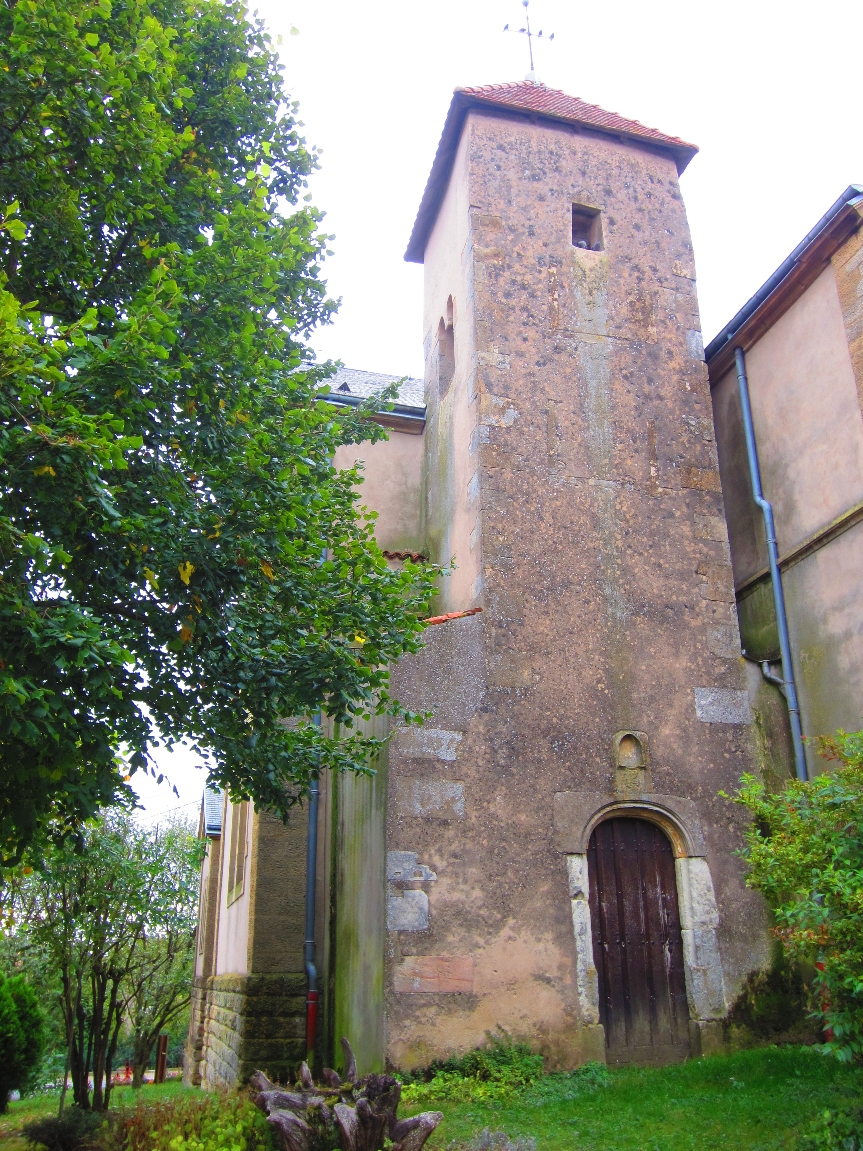 Eglise ancienne Sorbey